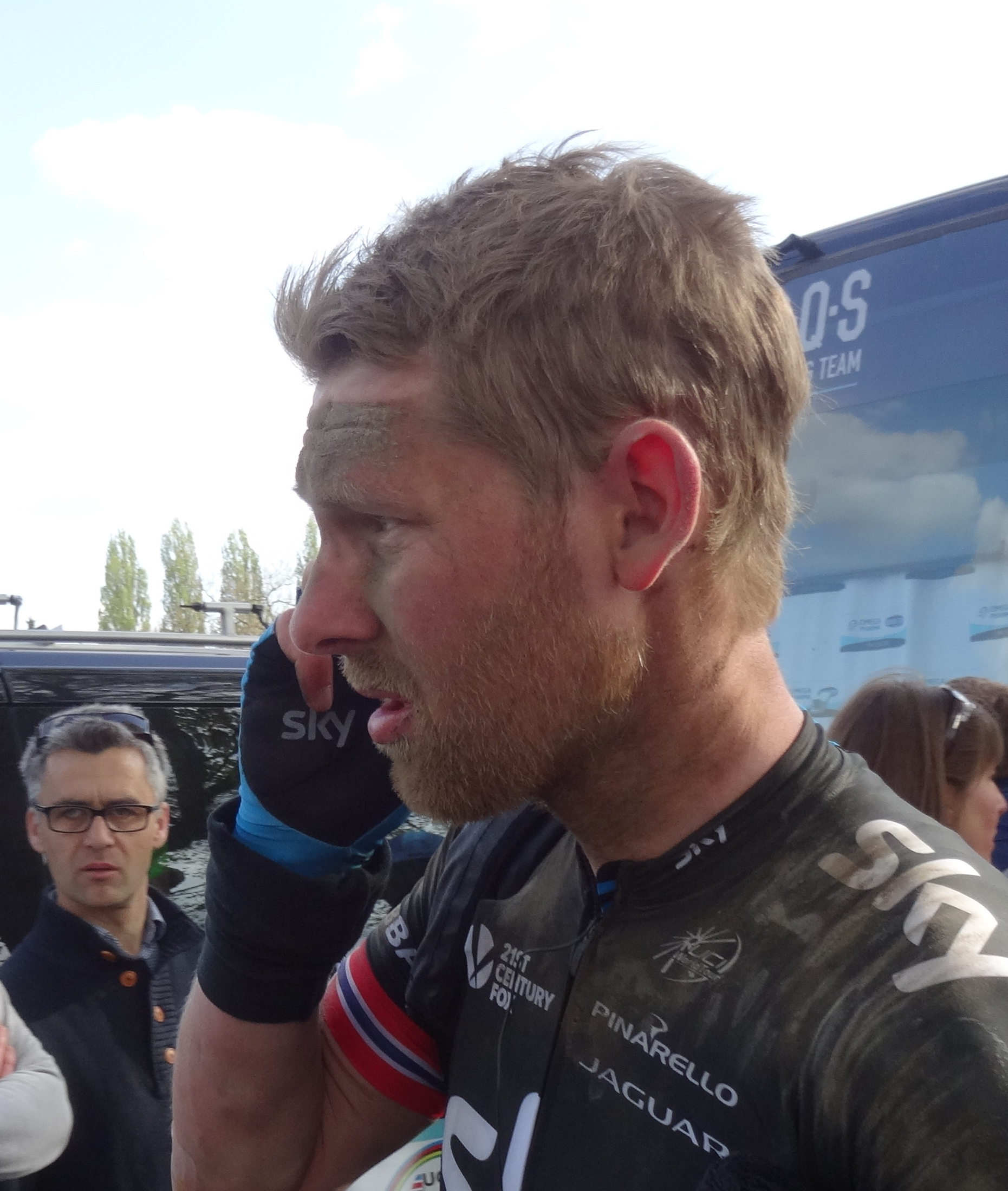 Retour des cyclistes à leurs bus après l'arrivée du Paris-Roubaix 2014 et pendant la remise des prix, le 13 avril 2014, à Roubaix, Nord, Nord-Pas-de-Calais, France. Depicted person: Gabriel Rasch